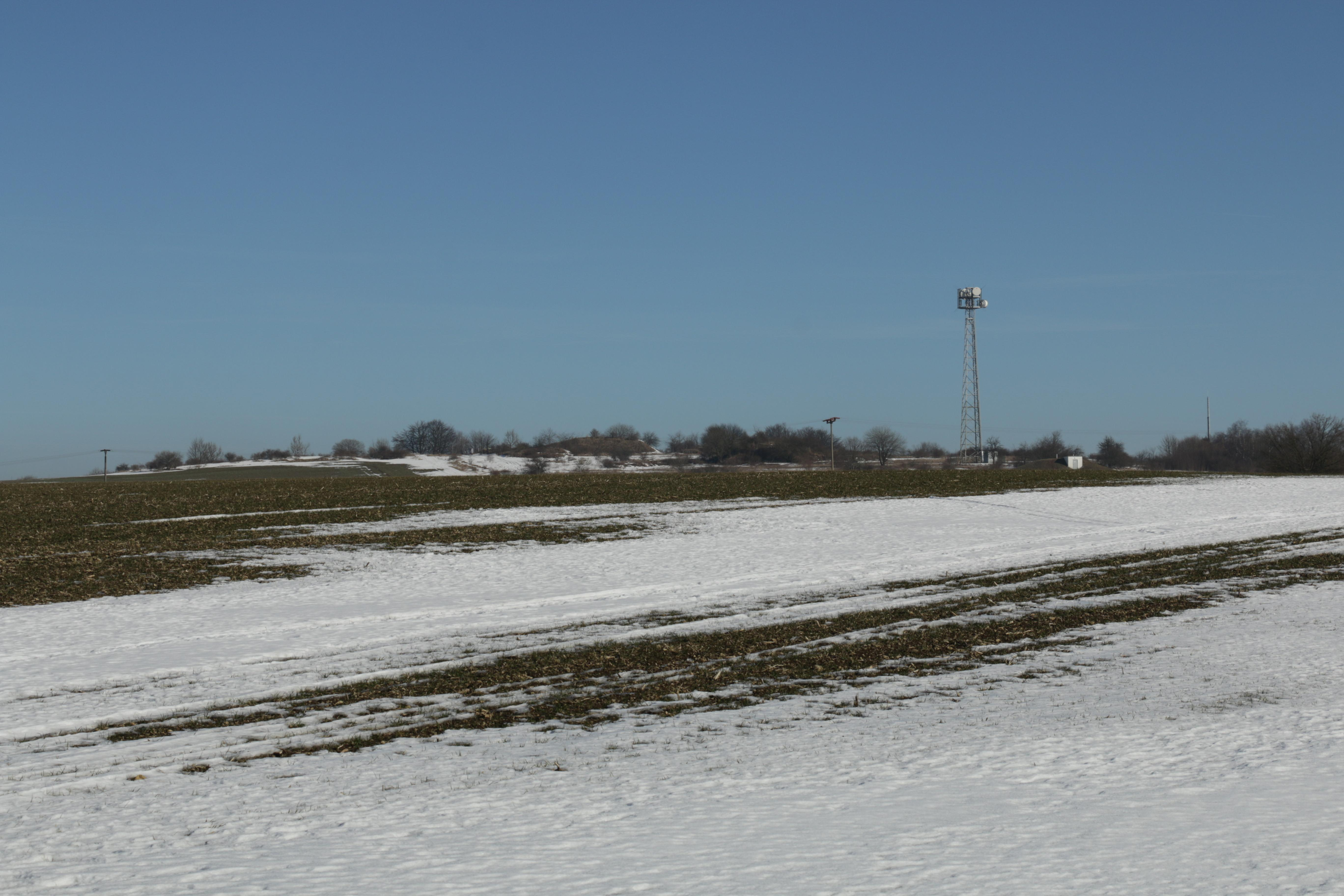 Ohmgebirge, Blick zum Birkenberg.